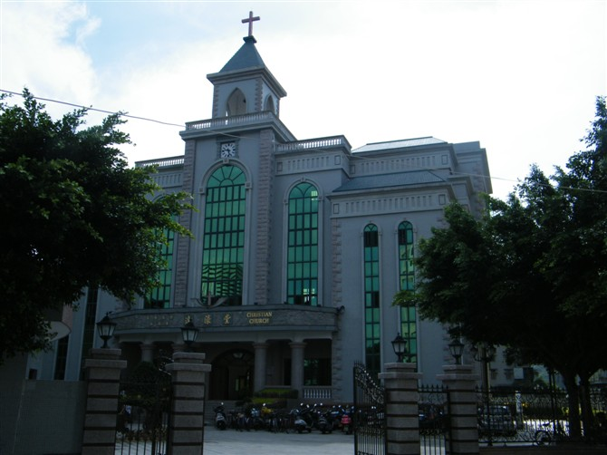 基督教达濠堂 2009.7.26